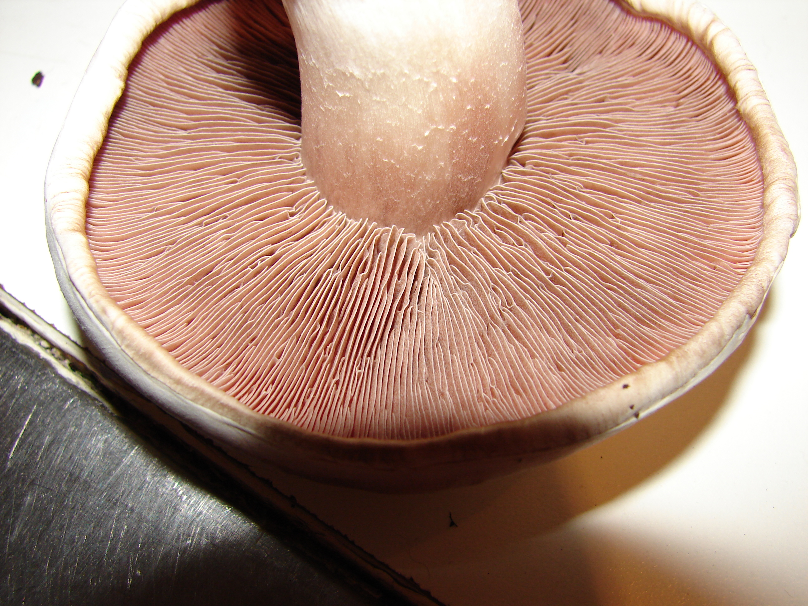 Gills of a common mushroom / Les lamelles d'un agaric